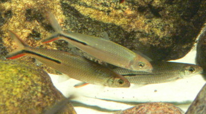 Hemiodus gracilis